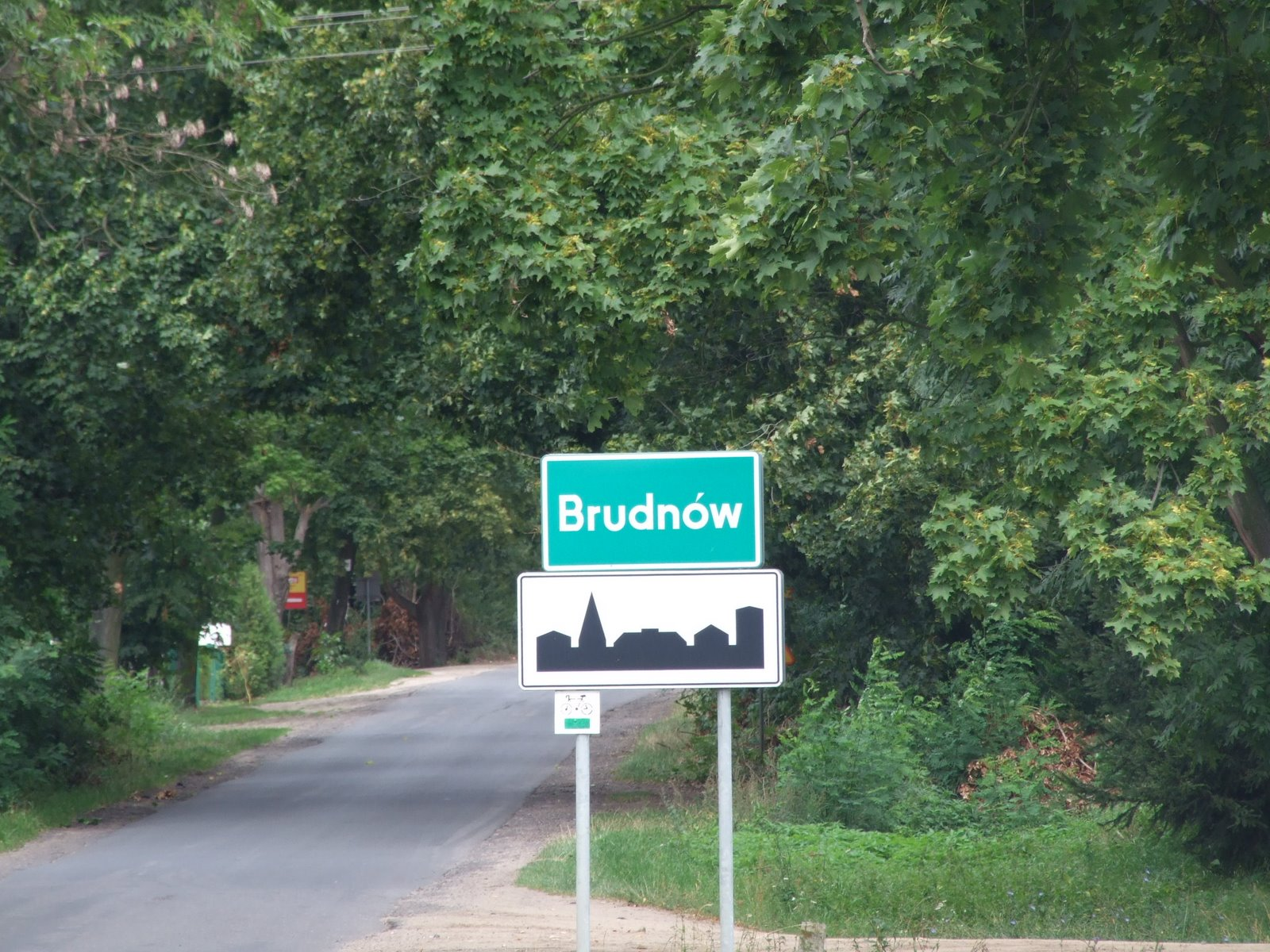 Tablica informacyjna - wjazd do miejscowości Brudnów Stary w gminie Dalików (łódzkie)